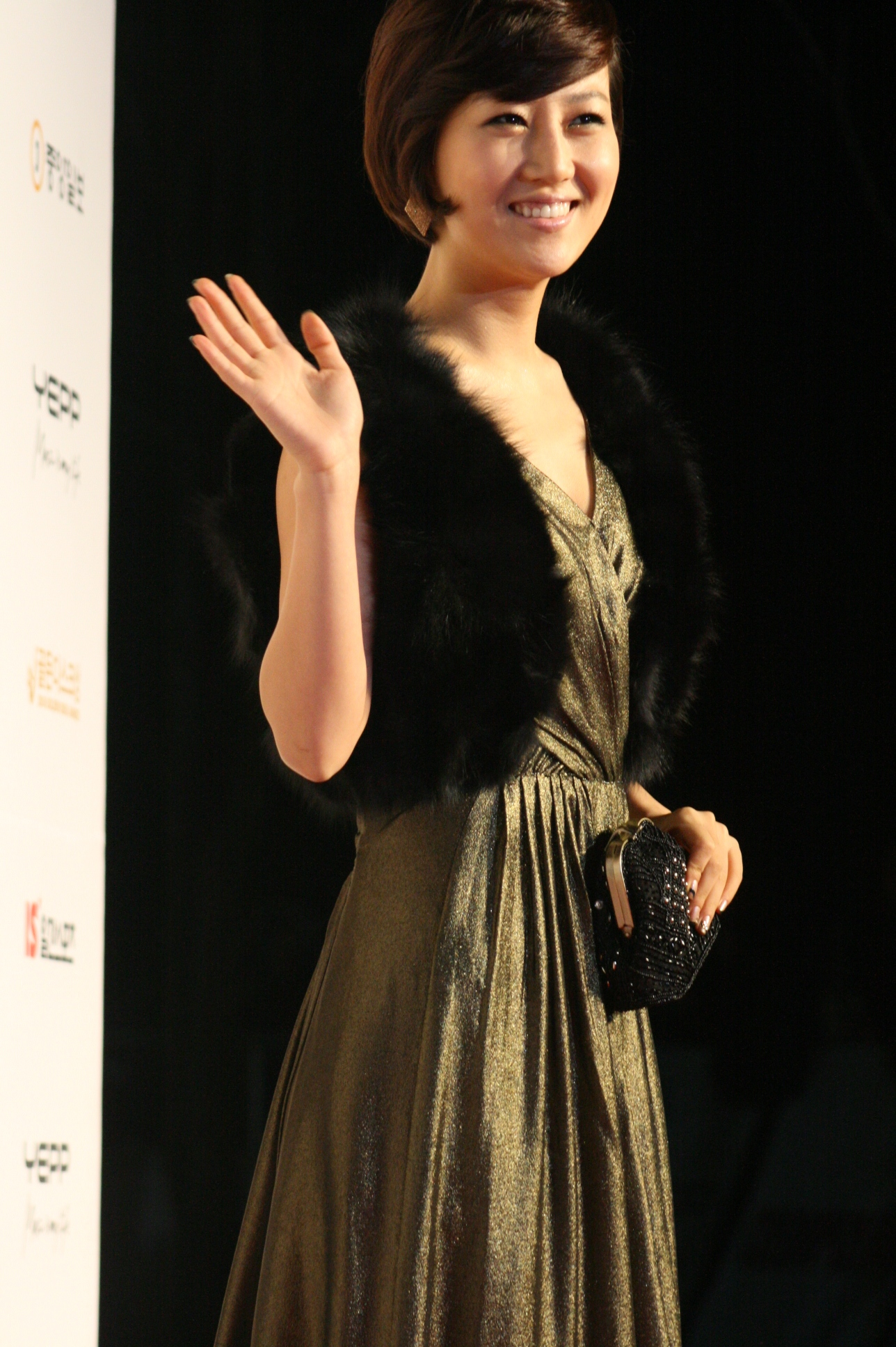 사진 069